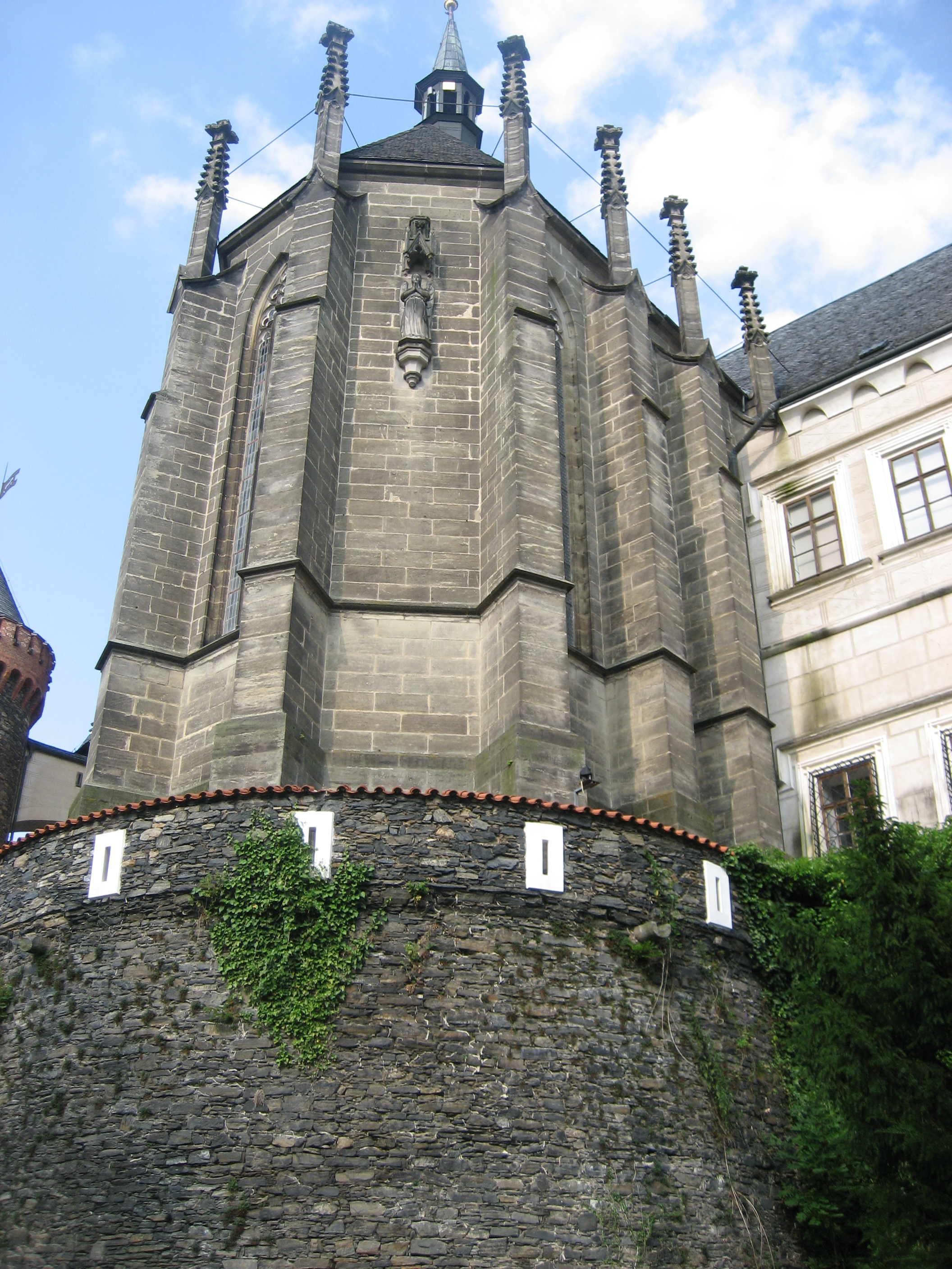 Zámek Žleby, Žleby 1, Žleby.